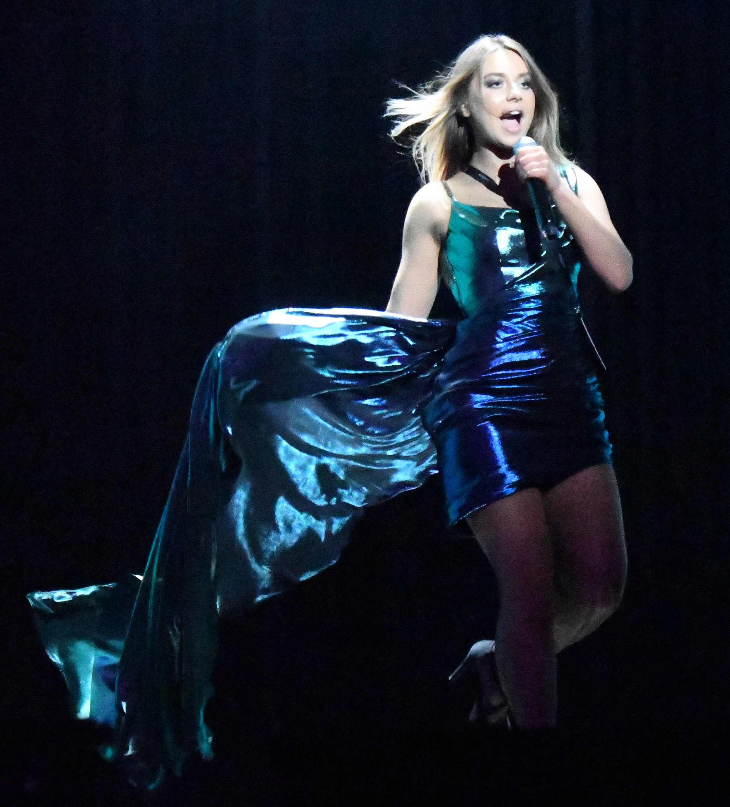 Melodifestivalen 2020, Malmö, Deltävling 4, repetition torsdag, Melodi nr 7 Brave, Hanna Ferm